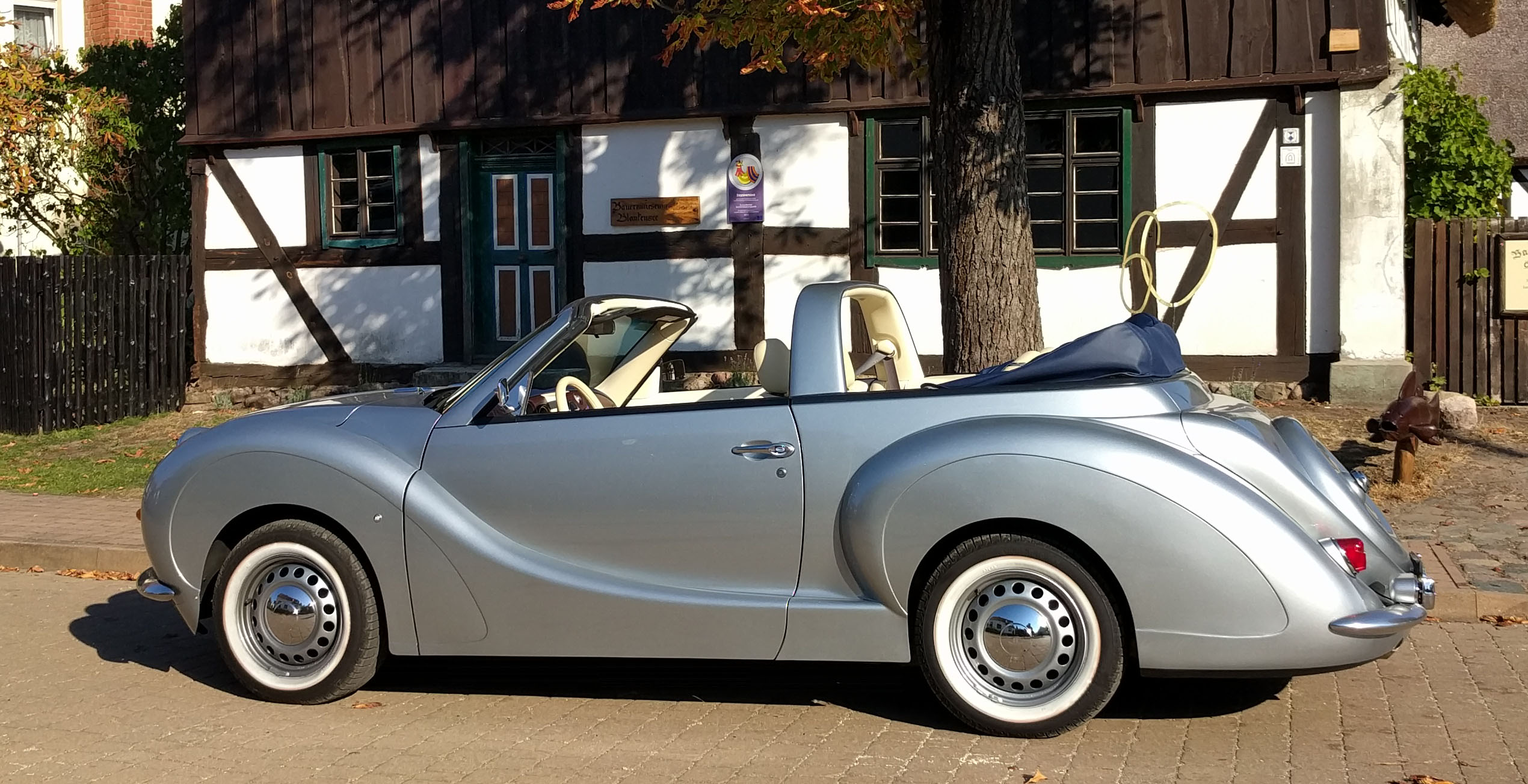 Hurtan Author silber